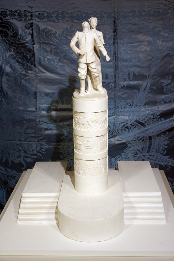 Foto del bozzetto in gesso dello dello scultore petriolese Diego De Minicis raffigurante la morte eroica di Filippo Corridoni creato per il concorso indetto dal Comune di Pausula, ora Corridonia, per la realizzazione del monumento cittadino